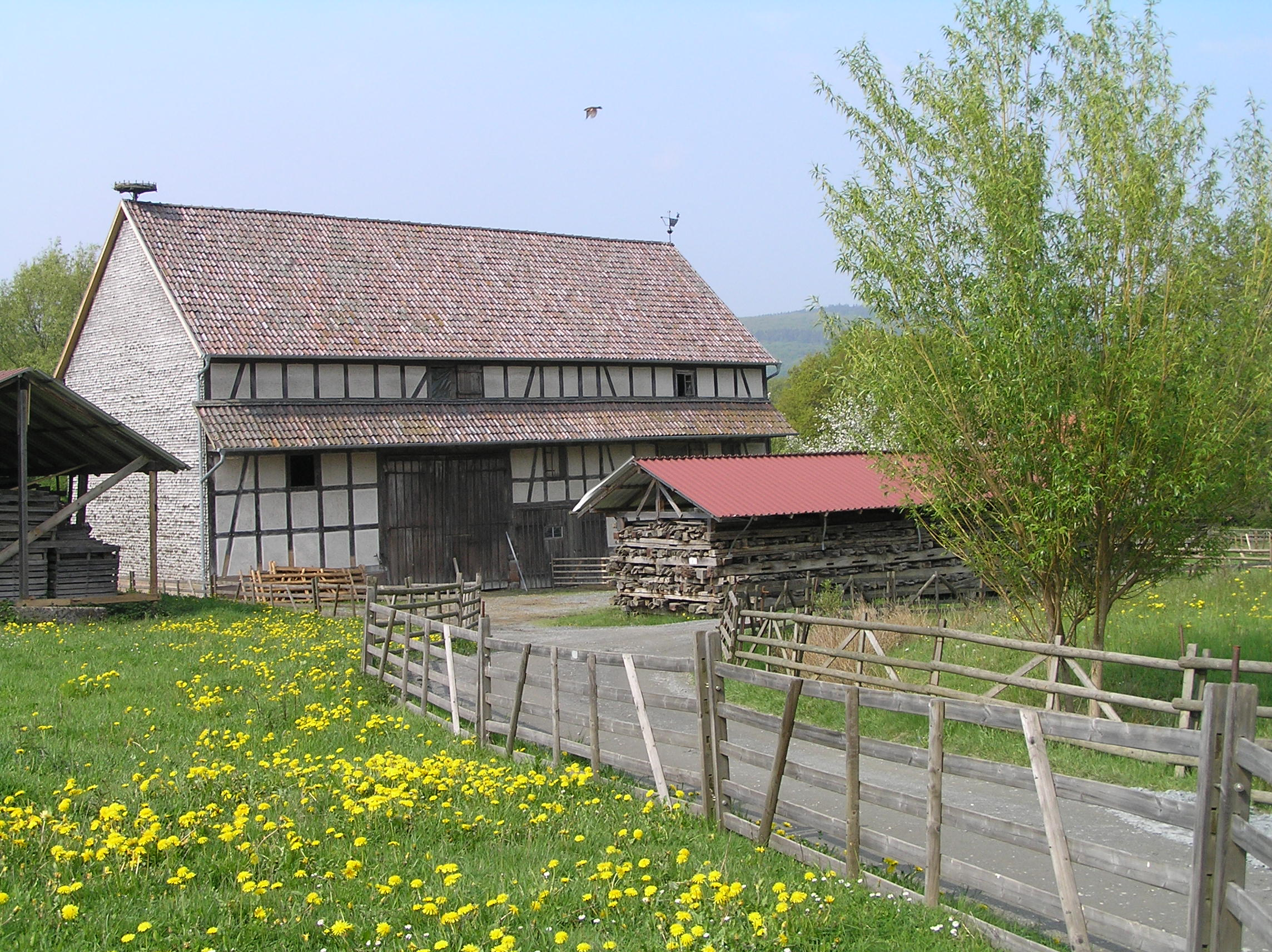 Hessenpark, Scheune aus Gungelshausen